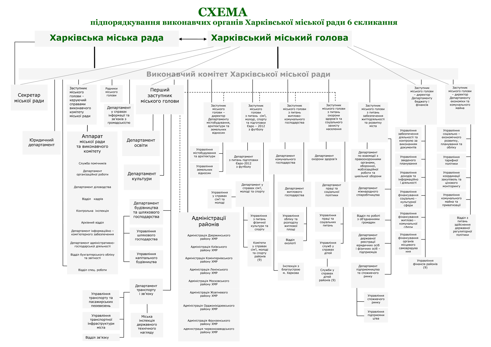 Структура Харьковского горсовета 6 созыва